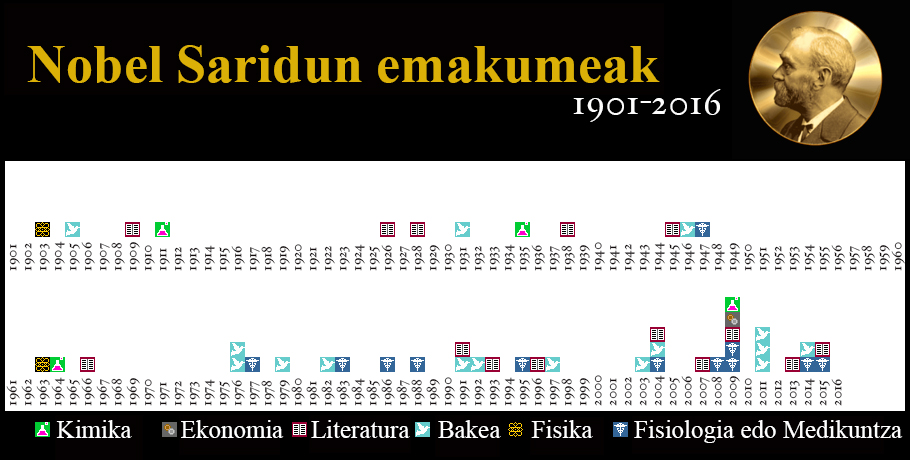 Nobel Saridun Emakumeak